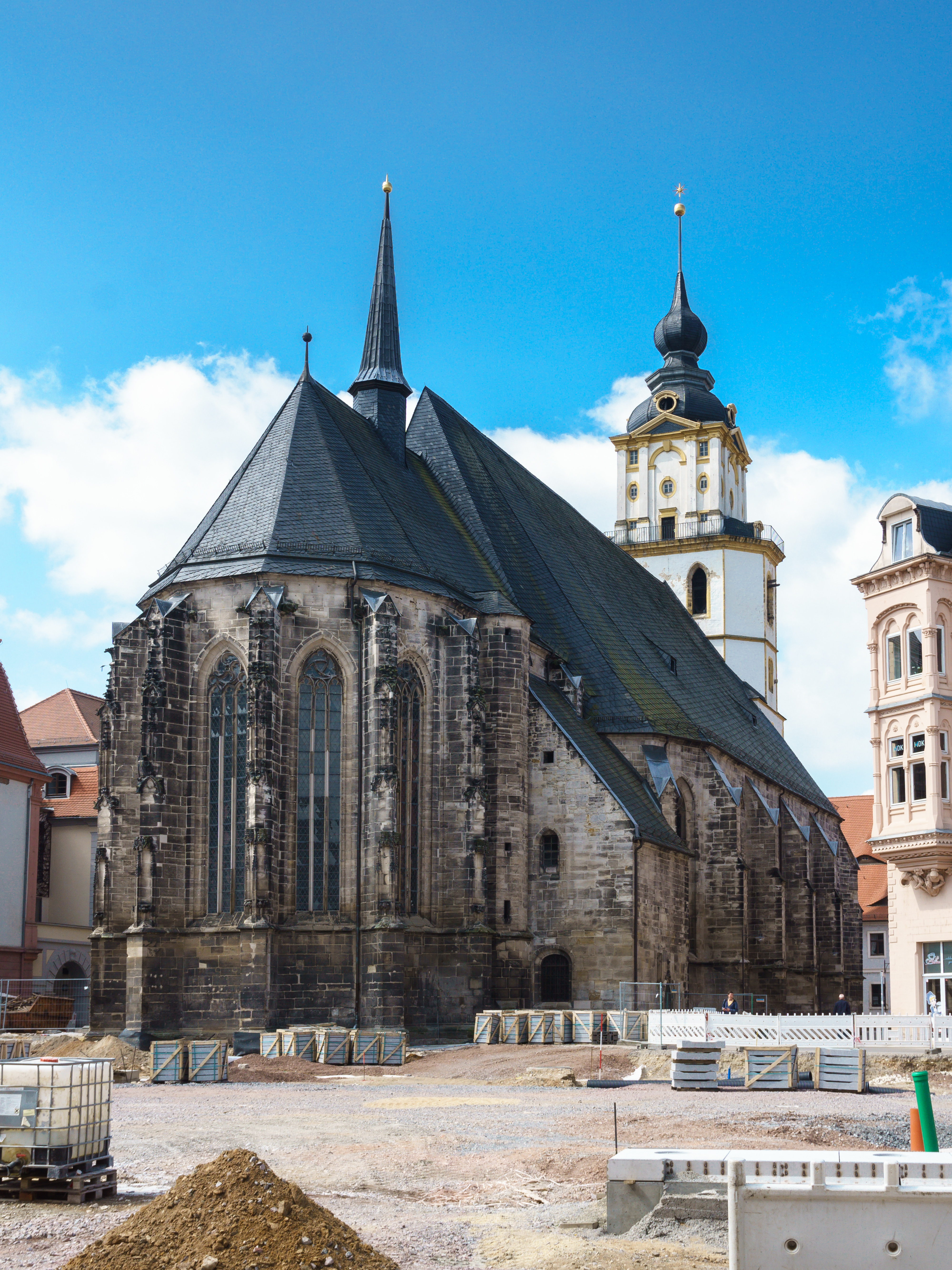 Marienkirche Marienkirchgasse 2 in Weißenfels